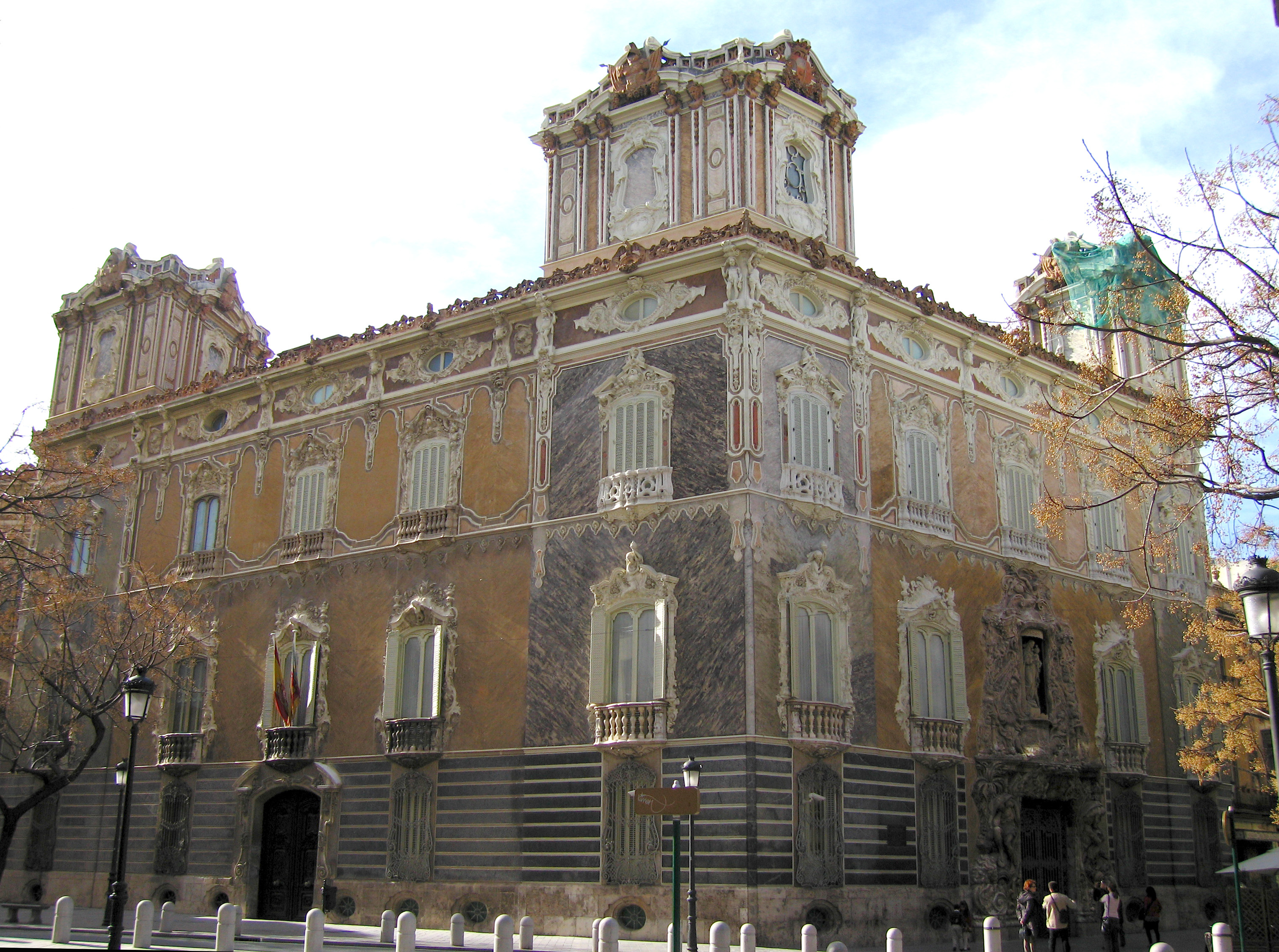 Palau del Marqués de Dosaigües